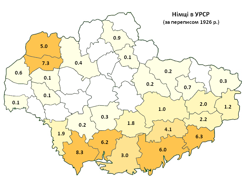 Розселення німців в УРСР за даними перепису 1926 р. / Germans in Ukrainian SSR according to 1926 census